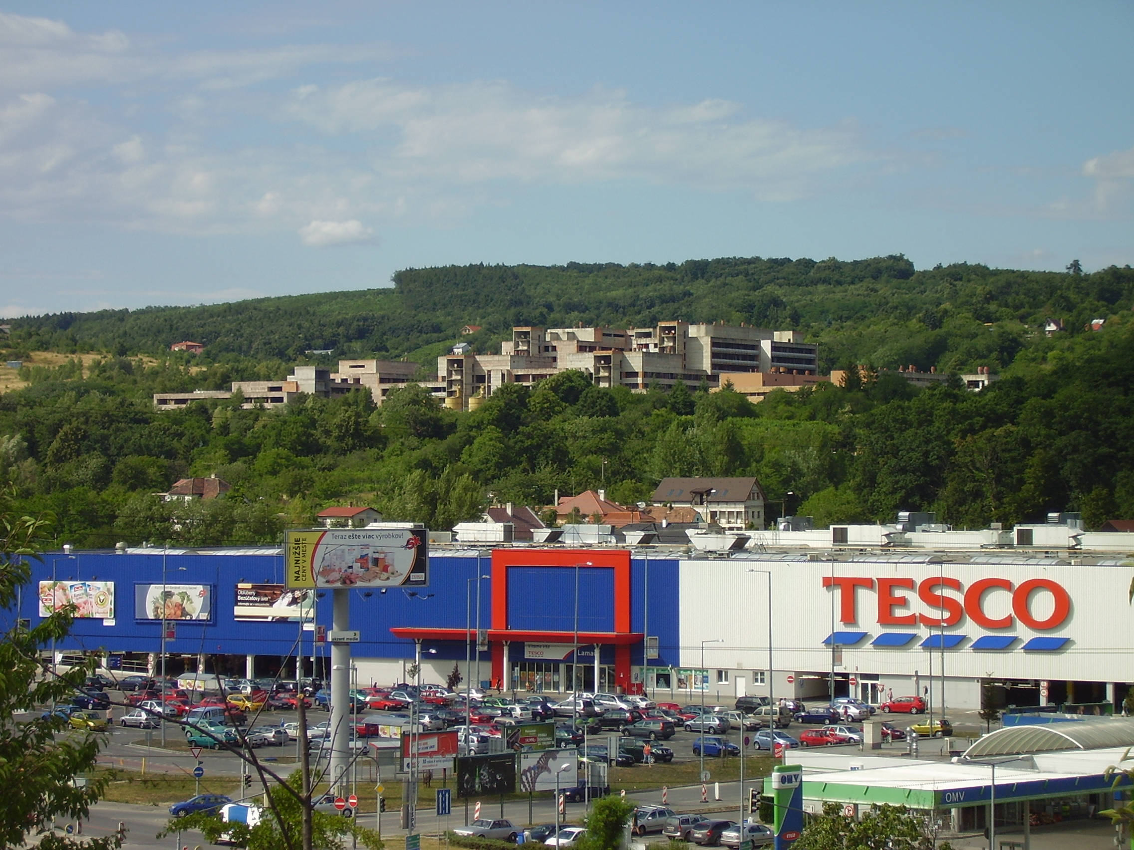 Bratislava